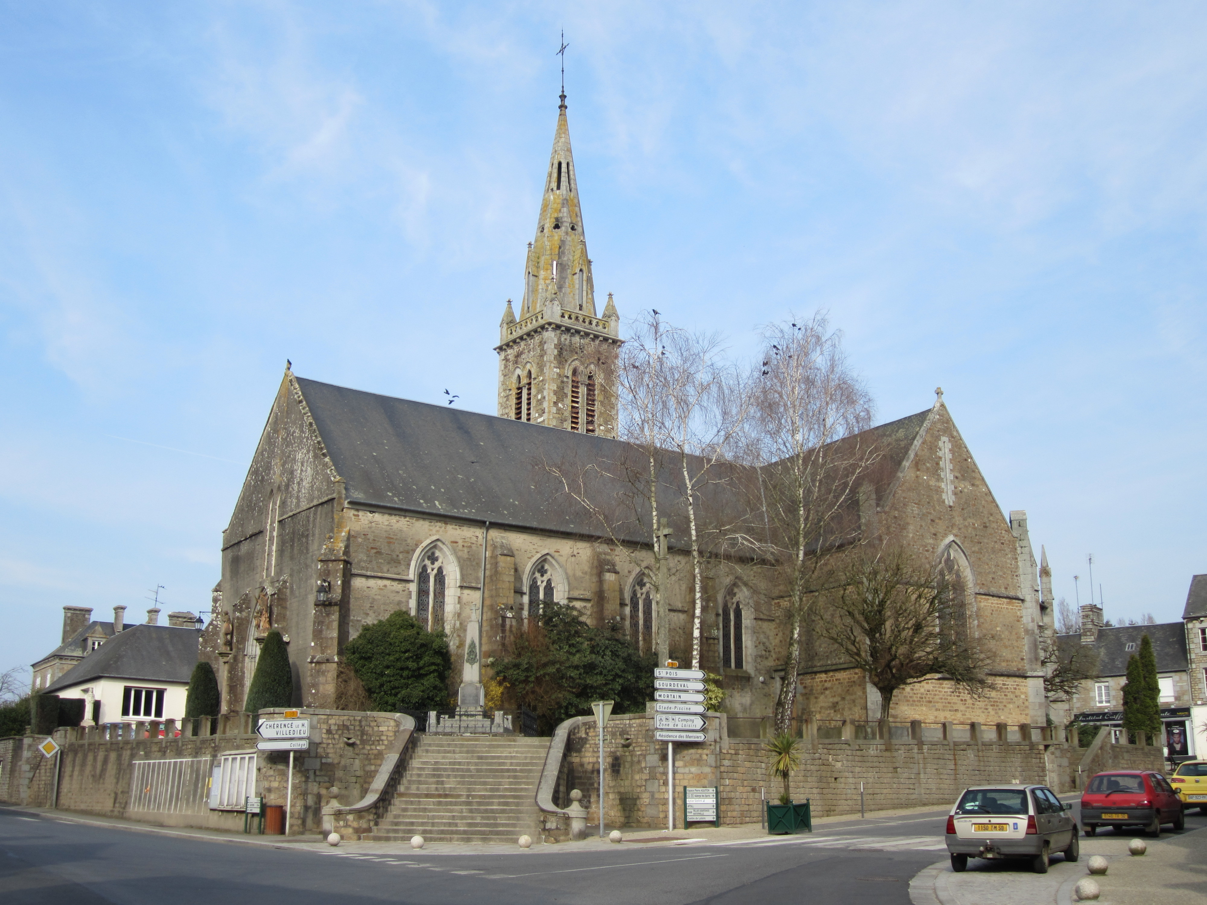 Église Saint-Martin de Brécey, MAnche